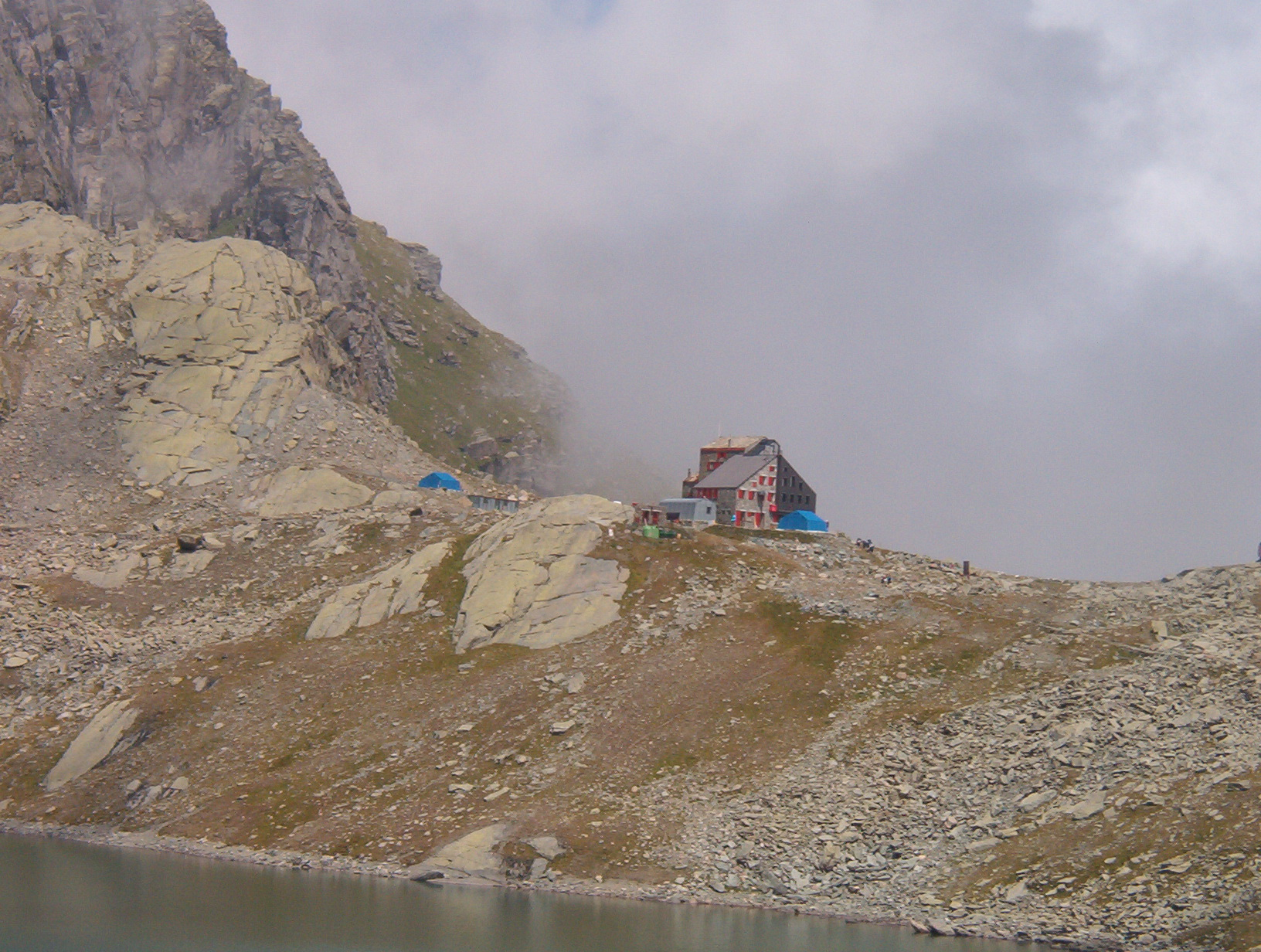 Rifugio Quintino Sella al Monviso, Crissolo, Provincia di Cuneo, Italia